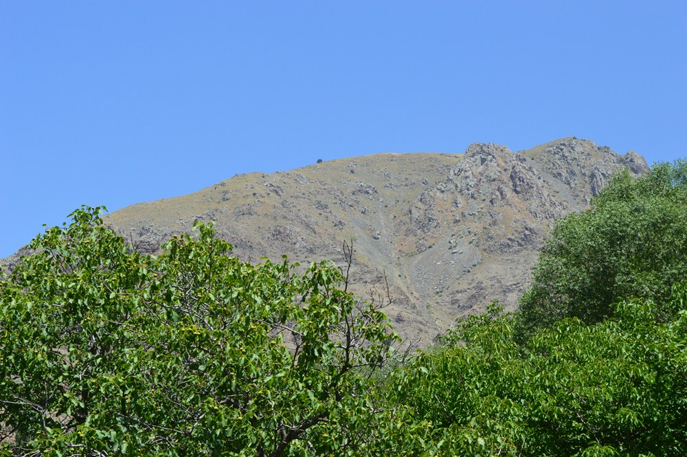 Ordubad rayonu Nüsnüs kəndi Yalqız ağac piri